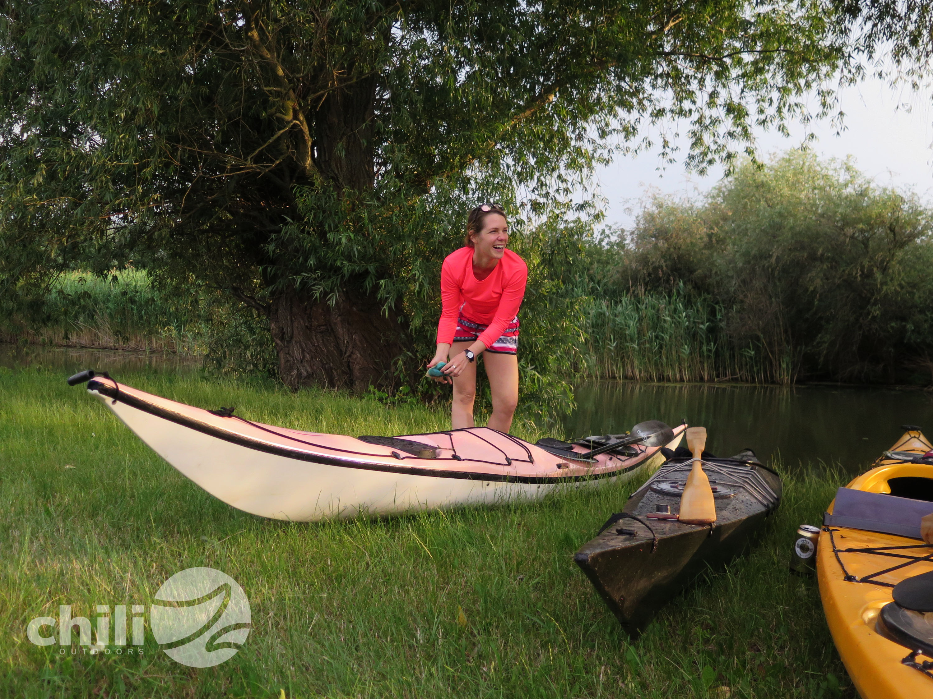 Üvegszálas, skin on frame és polietilén kajakok